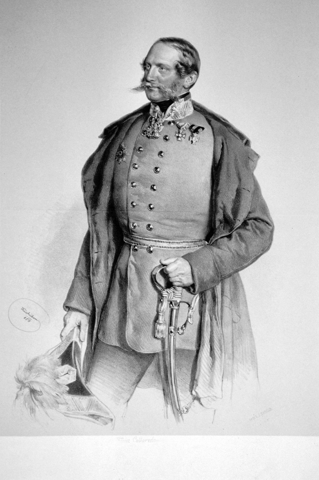 Franz de Paula Gundaccar II Colloredo-Mansfeld (1802-1852),Feldmarschallleutnant